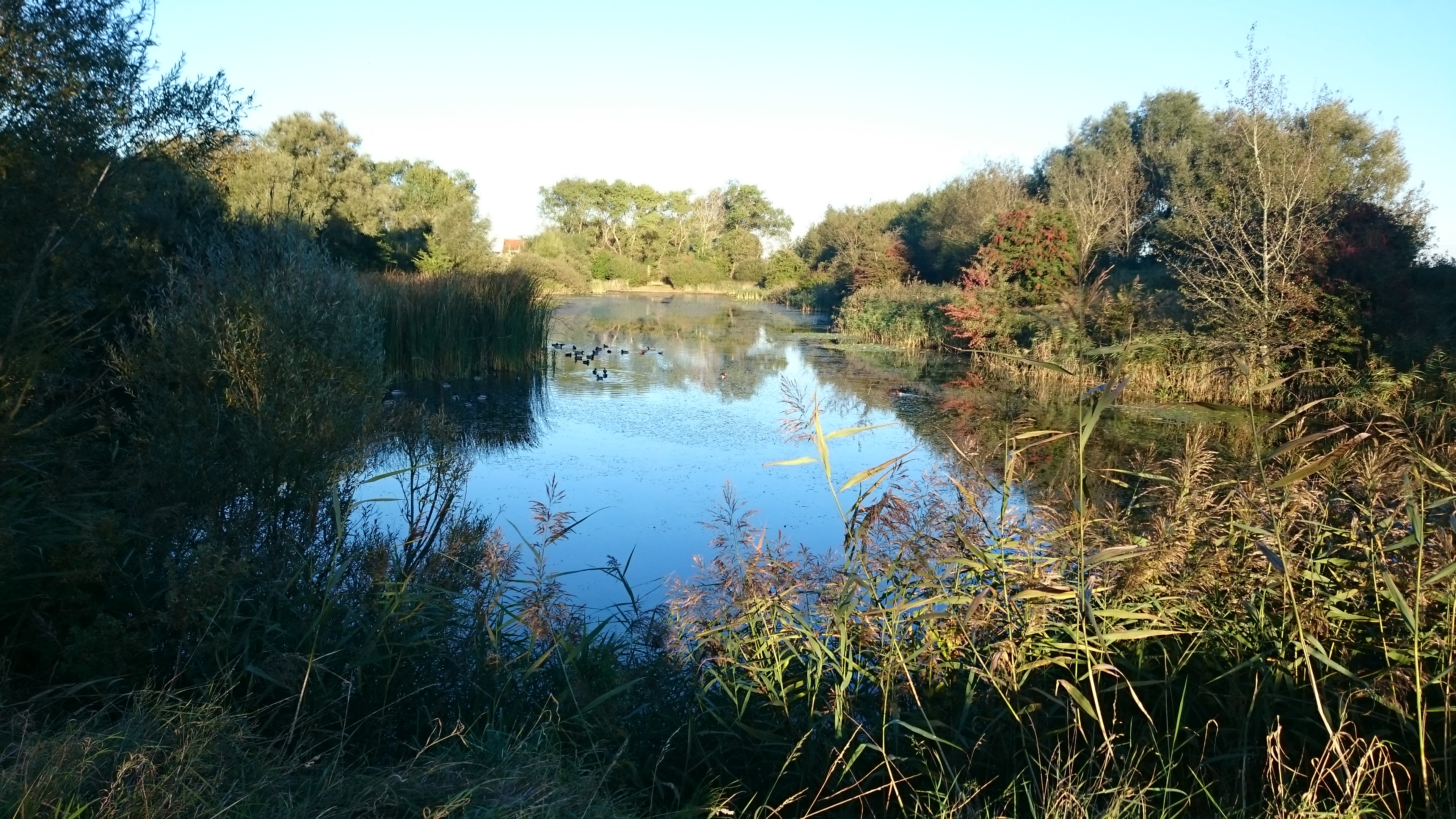 L'étang Markey sud, protégé, vers l'est.